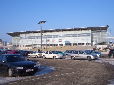 Front view of Albert-Schultz-Halle. Albert-Schultz-Halle is an ice-arena in Vienna, Austria.